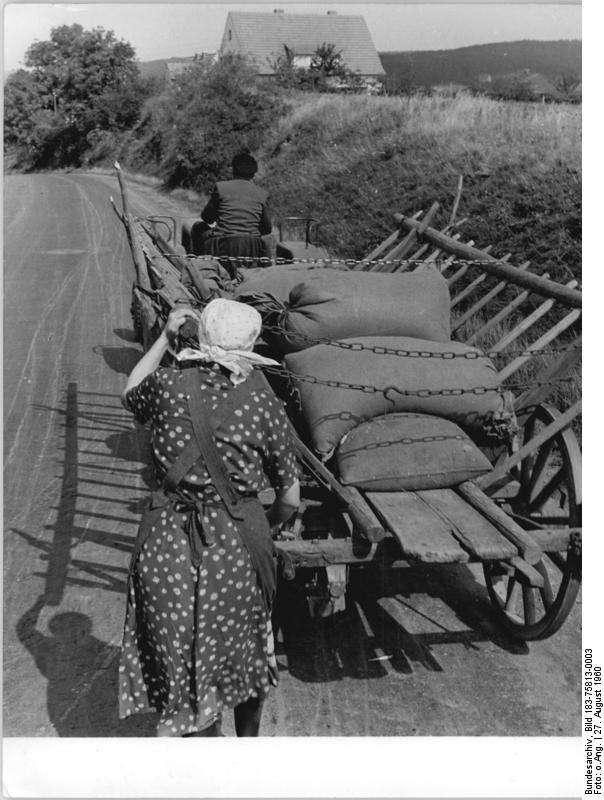 Missernte, Abtransport der Ernte Zentralbild RS-Fr. 27.8.1960 Ernterückstand in Nordhessen - noch 80 Prozent des Getreides auf den Feldern. Erst 20 Prozent der mit Getreide bestellten Flächen waren am 24.8.1960 in Nordhessen abgeerntet. Etwa ein Drittel der Halmfrüchte ist noch nicht einmal gemäht. Vielfach sind große Schläge vom Wind und Regen förmlich niedergewalzt, und der Roggen ist bereits stark vom Unkraut durchwuchert. Agrarexperten schätzen auf Grund dieser kritischen Situation, daß etwa 50 Prozent der gesamten Ernte nur noch für Futterzwecke verwendet werden können. Der Erntetermin ist für die Gebiete Nordhessens im Vergleich zu den normalen Jahren um durchschnittlich vier Wochen überschritten. UBz: Bauer Wagner aus Obermeischer im Kreise Hofgeismar auf dem Wege zur Getreideabnahmestelle. Er weiß nicht, ob ihm sein Getreide überhaupt abgenommen wird, weil sein Roggen einen Auswuchsanteil bis zu 30 Prozent hat. Die Einkaufs- und Vorratsstellen für Getreide übernehmen Roggen nur mit einem Auswuchsanteil bis zu sechs Prozent.